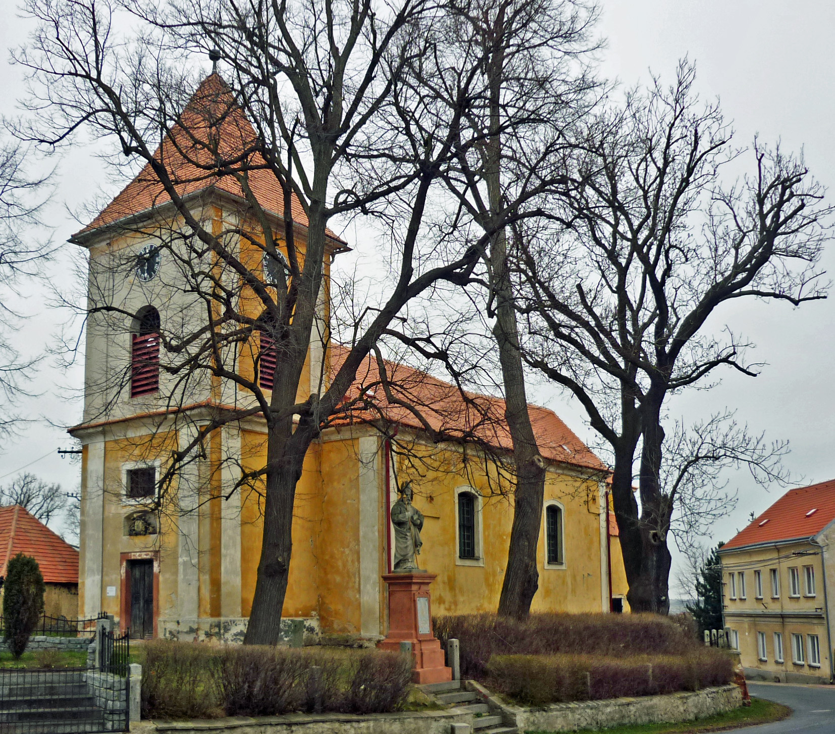 St. Nikolaus-Kirche in Pomeisl (Nepomyšl)